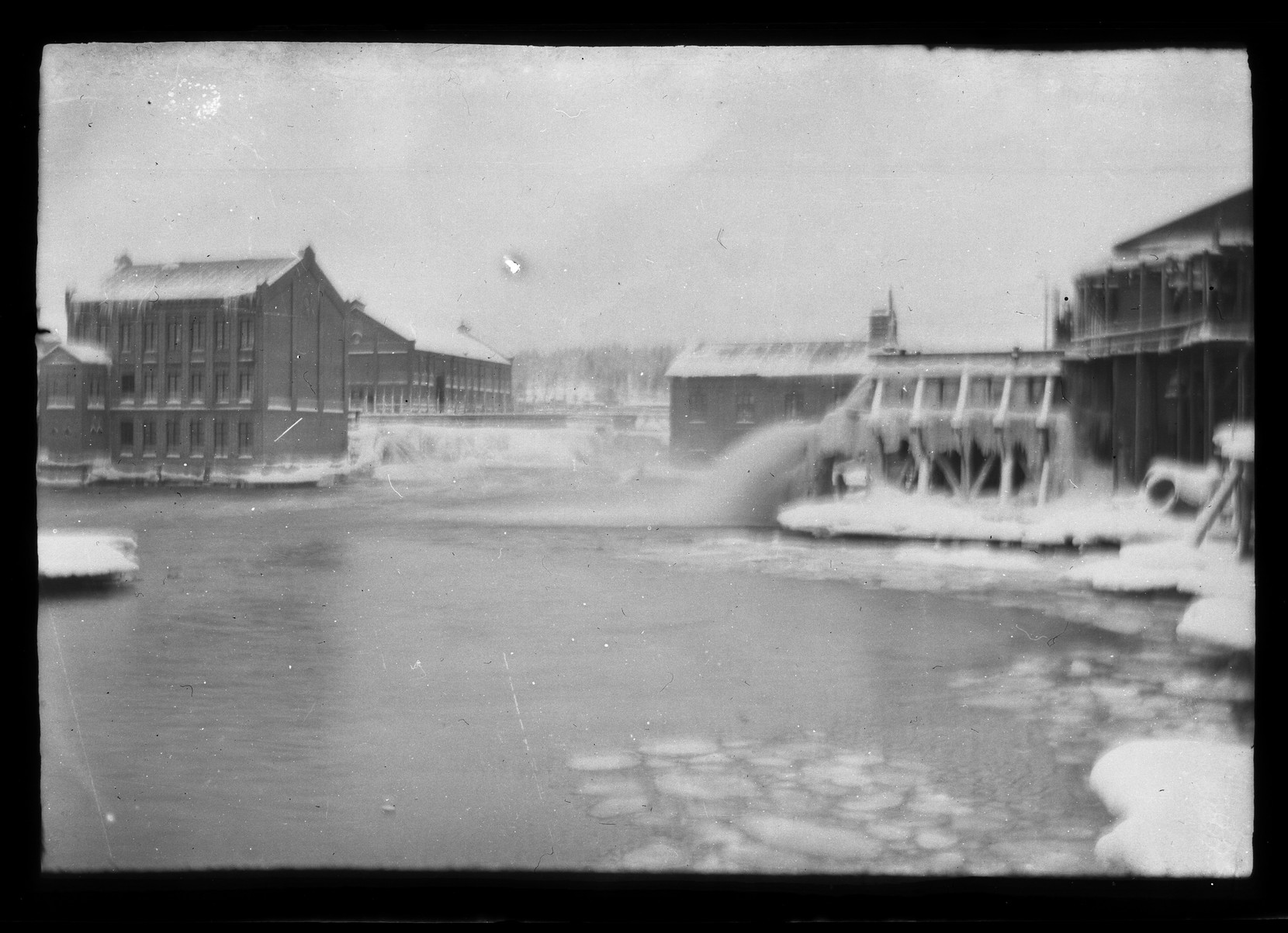 HS Modeller Kymmene, Karl Swanljung -adressen 5 valokuvafilmi, selluloosanitraatti, leveys 82 mm, korkeus 55 mm Asiasanat: valokuvat, Kymmene, yhtiö (Kymmene Aktiebolag, Kymin Oy), Kymintehdas, Kuusankoski, tehtaan vesivoimala, yleiskuva, eksteriööri, pato, punatiilirakennus(useita), talvi, jää, puunjalostus ; Karl Swanljung -adressi ja taiteilijan malli teoksiin Vesivoimalaitos I-II Hugo Simbergin jäljillä - Kansallisgalleria, Hugo Simbergin arkisto